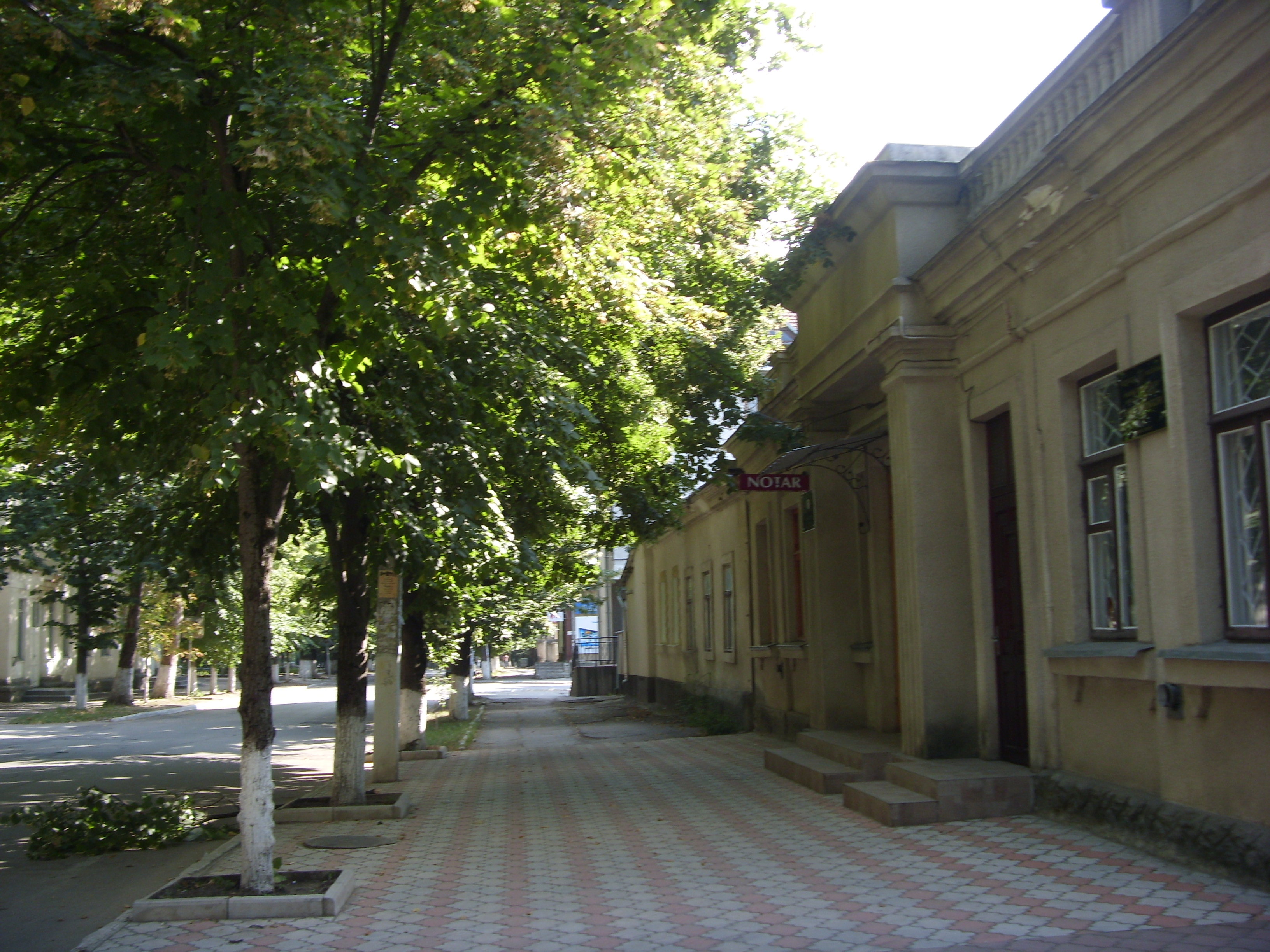 Улица в центре г. Оргеев